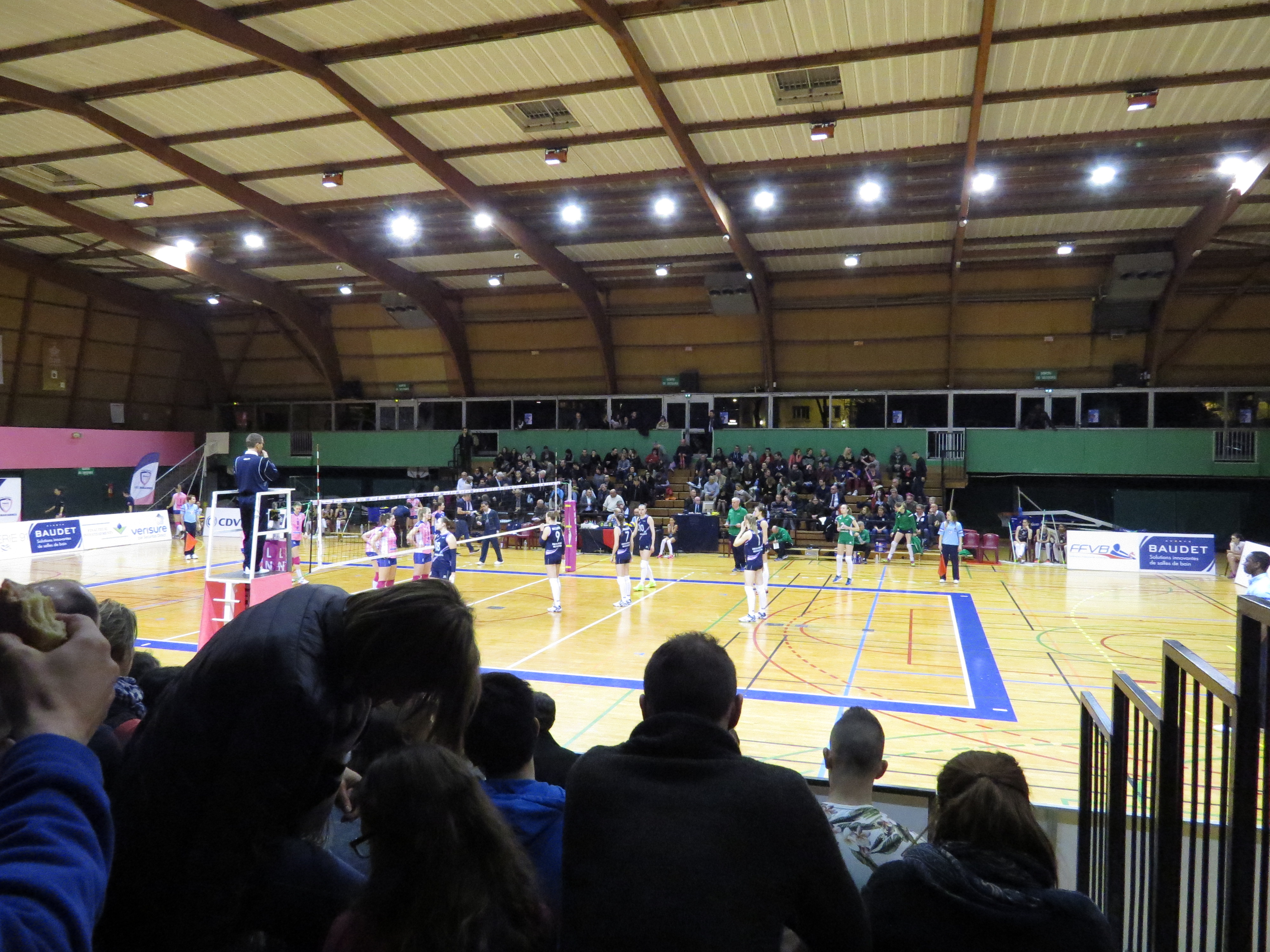 Match de Challenge Cup, quart de finale retour, entre le Stade Français et Odintsovo